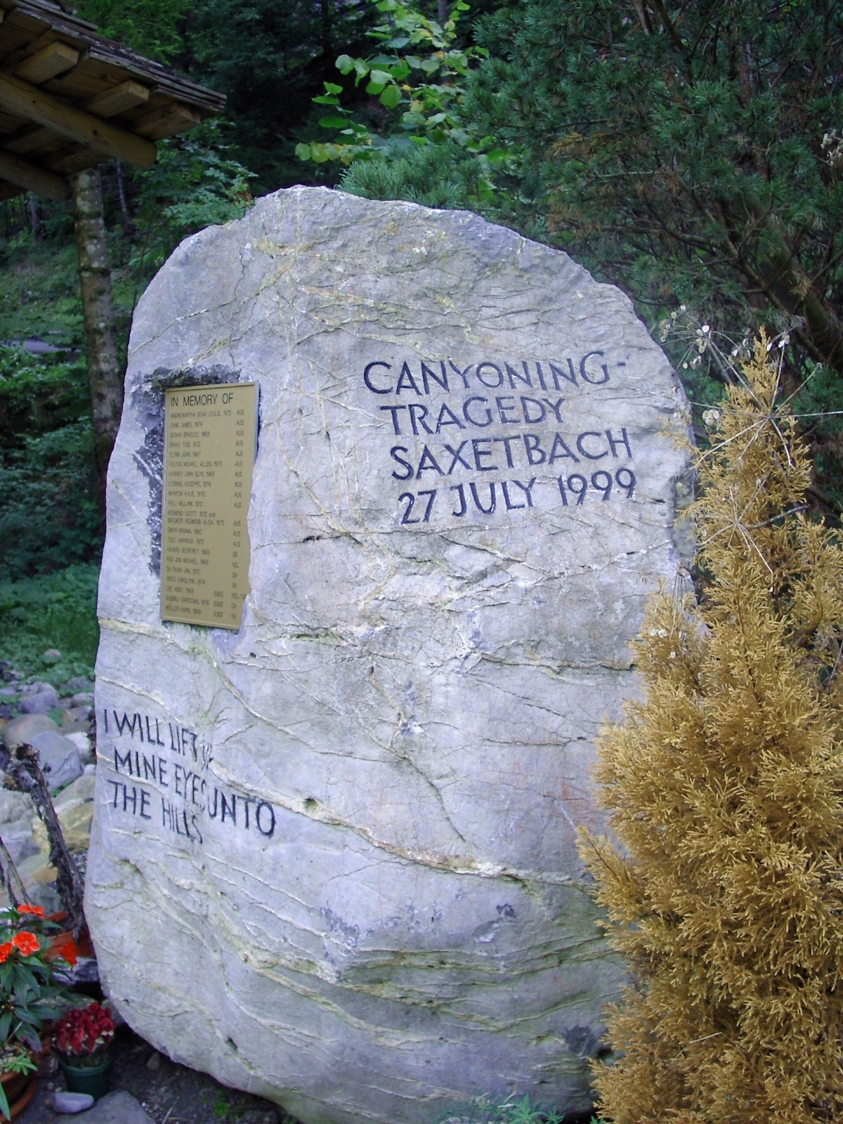 Gedenkstein zum Saxetbachunglück in Wilderswil 1999